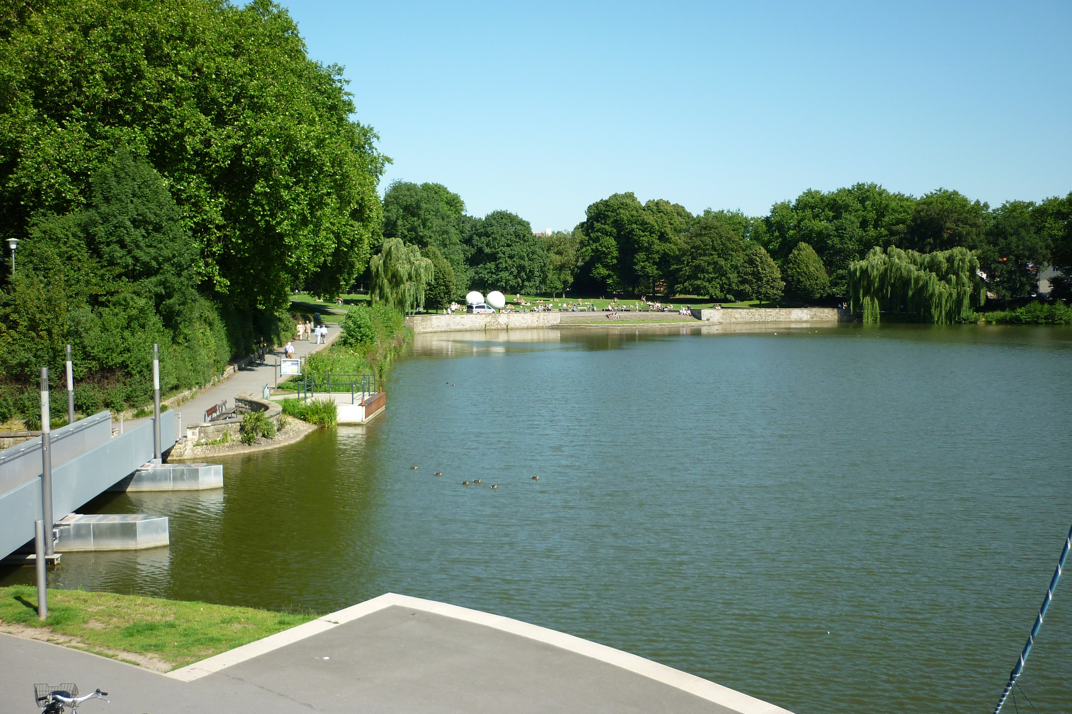 Münster. Aasee, Blick zum Aegidiitor mit Bootsanleger für das sogenannte Wassertaxi "Professor Landois".